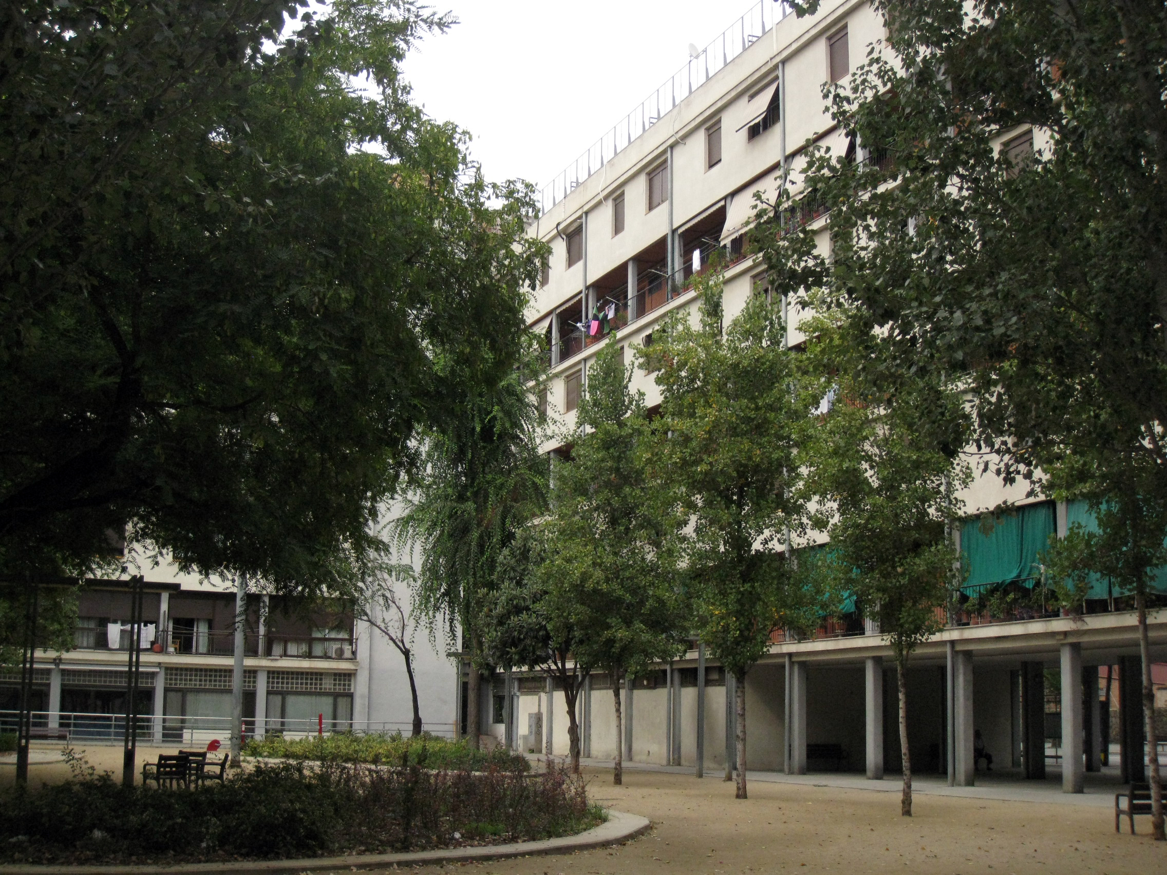 Casa Bloc, edifici racionalista construït pels arquitectes Josep L. Sert, Joan B. Subirana i Josep Torres (1932-1936) a Sant Andreu (Barcelona), a l'avinguda de Torres i Bages núm. 91-105.